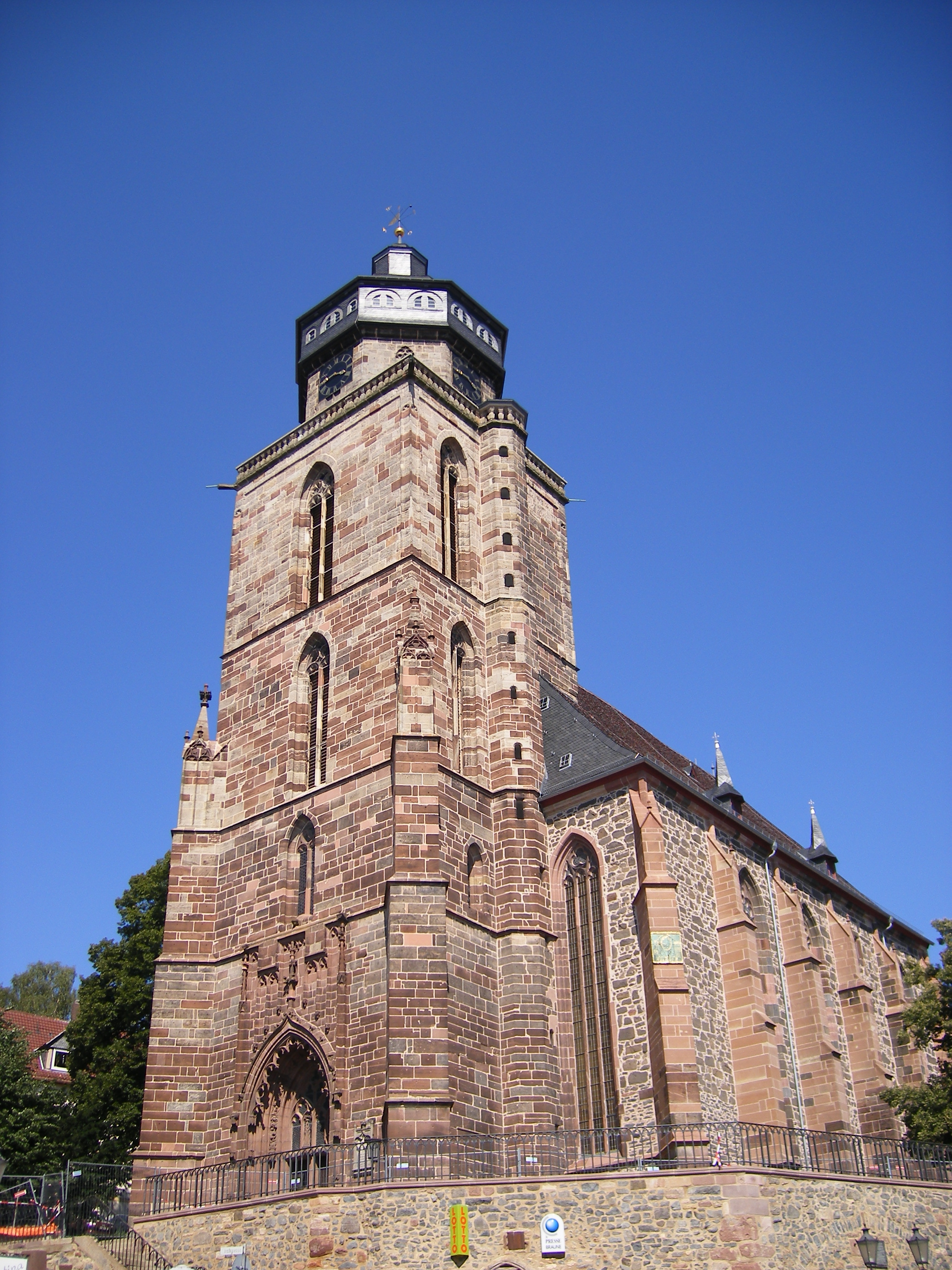 Stadtkirche mit erneuertem Gitter auf dem Kirchplatz